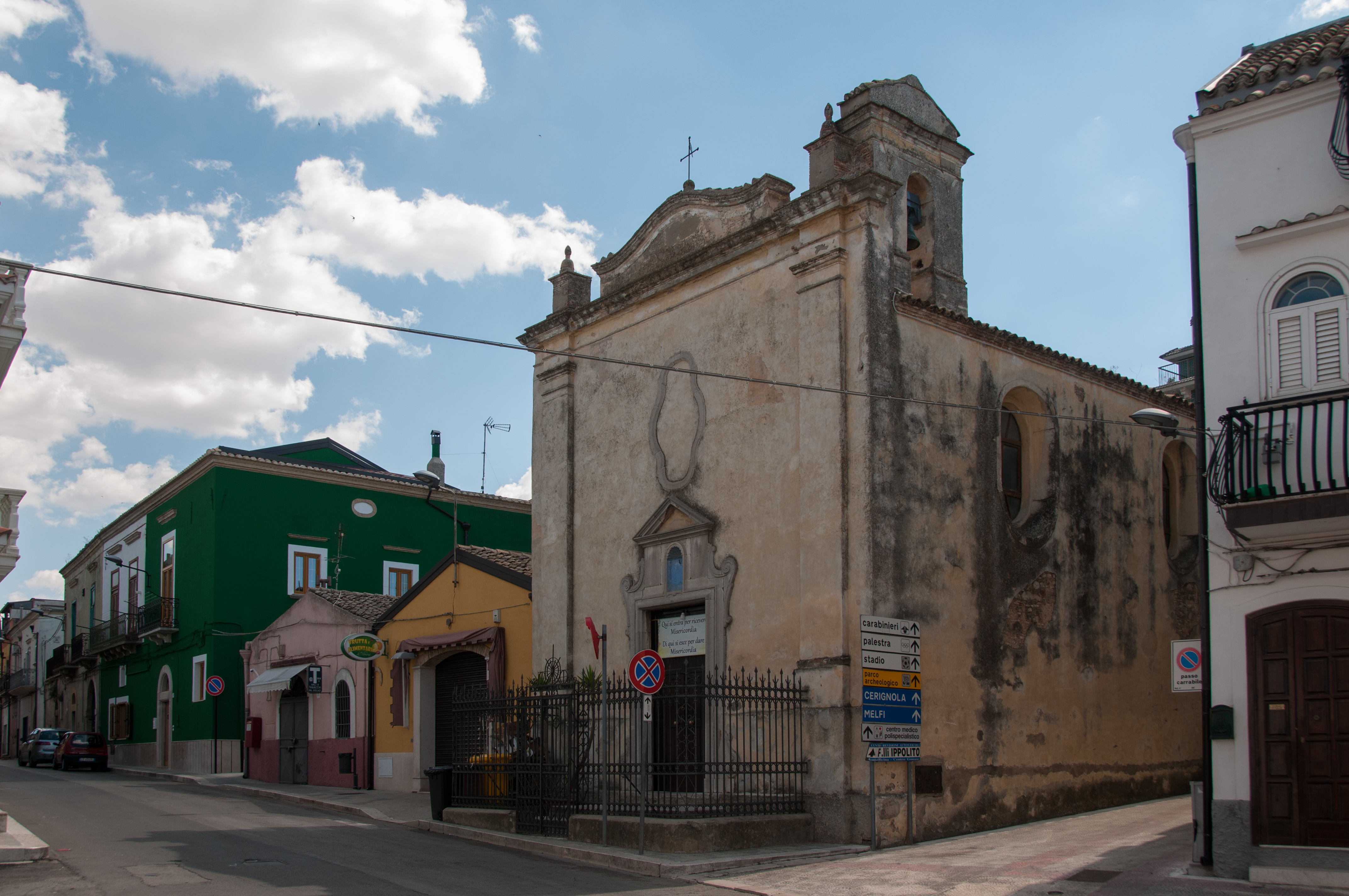 San Rocco